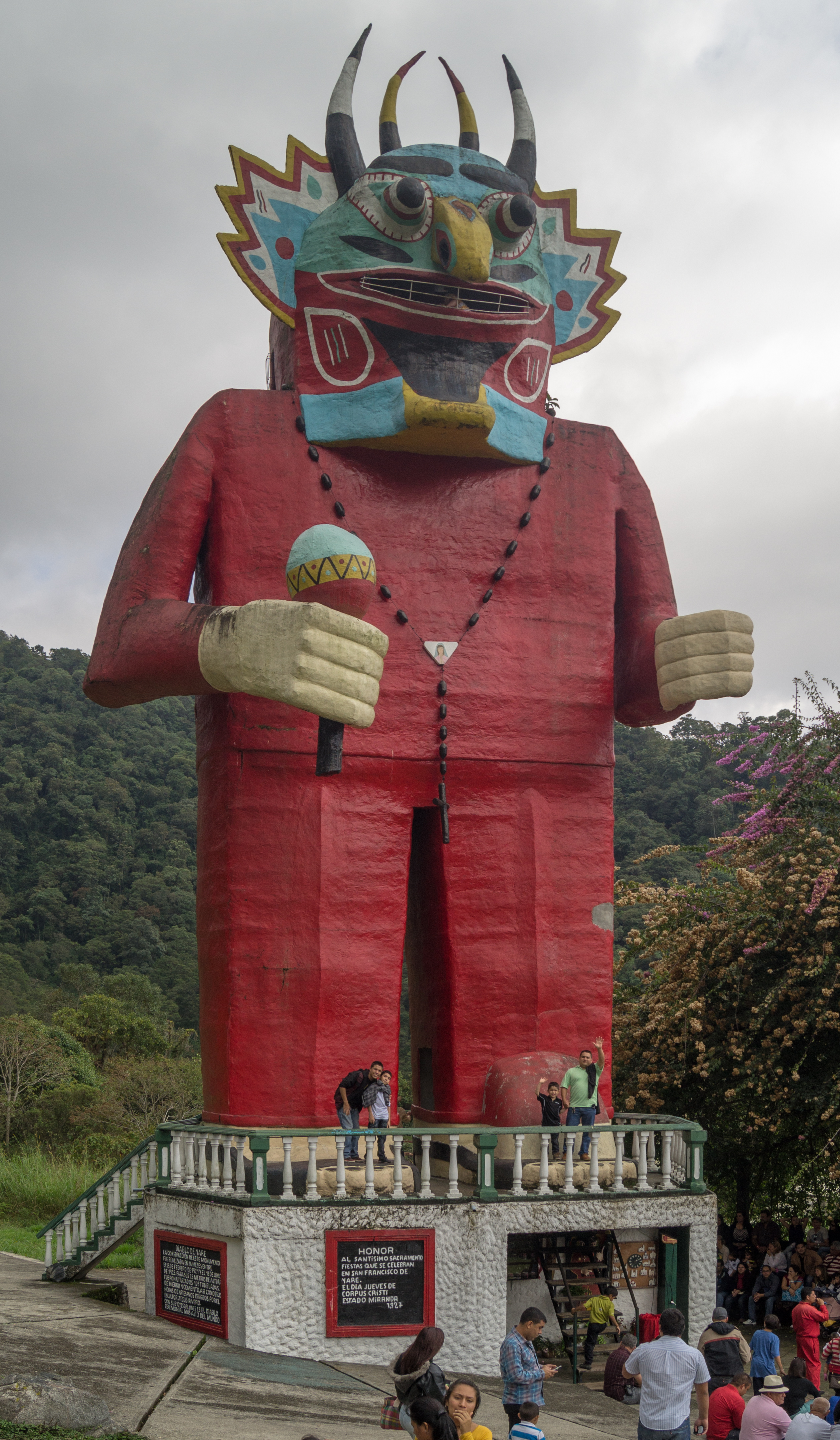 Monumento Diablo danzante de Yare en el parque temático de La Venezuela de Antier. La construcción fue realizada en 16 meses, entre el 15 de febrero de 1924 y el 15 de junio de 1925, tiene 25 metros de altura. Mérida. Venezuela.